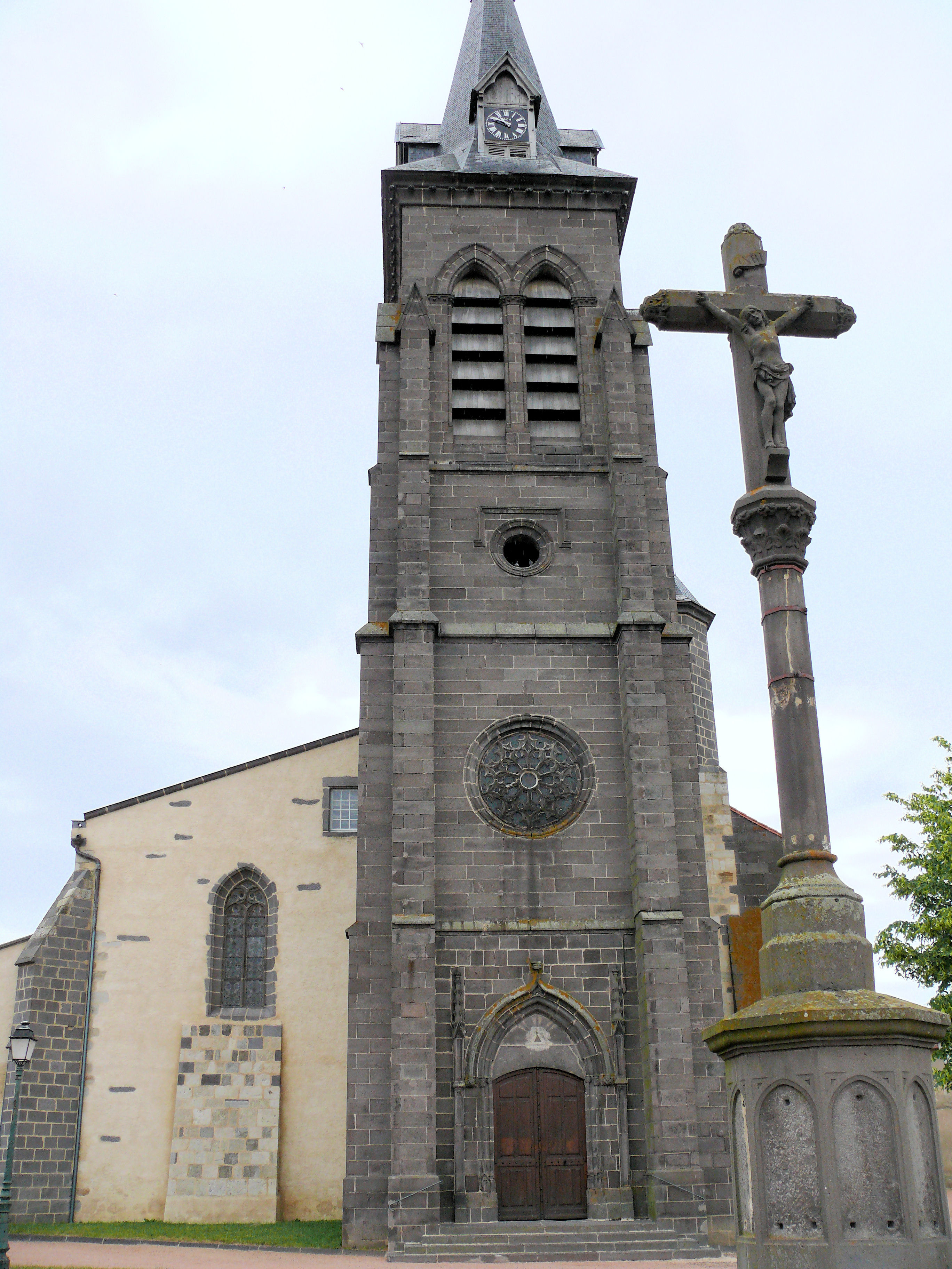 Maringues - Eglise